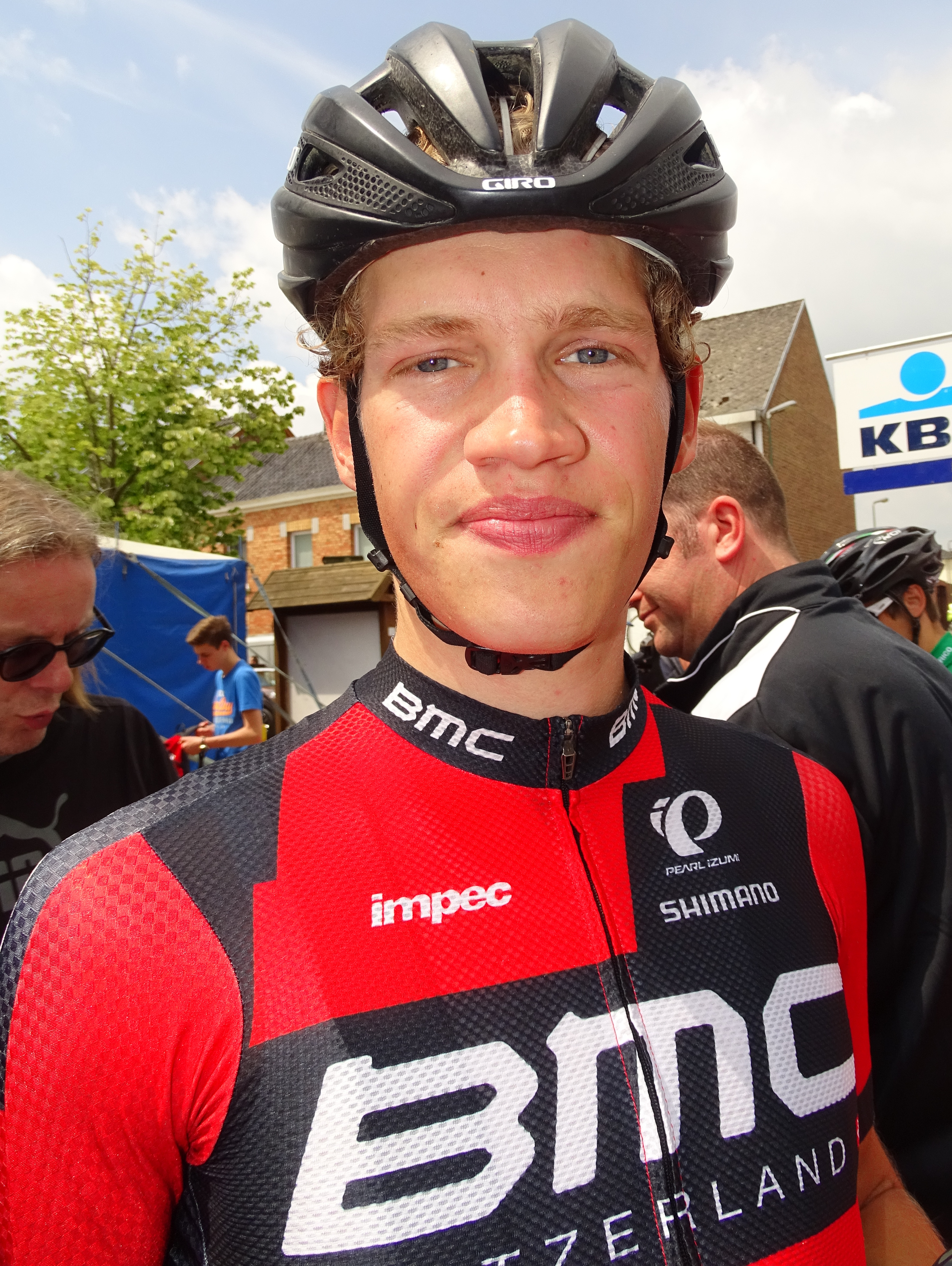 Reportage réalisé le mercredi 24 juin à l'occasion du départ et de l'arrivée de l'Internationale Wielertrofee Jong Maar Moedig 2015 à Oetingen (Gooik), Belgique.